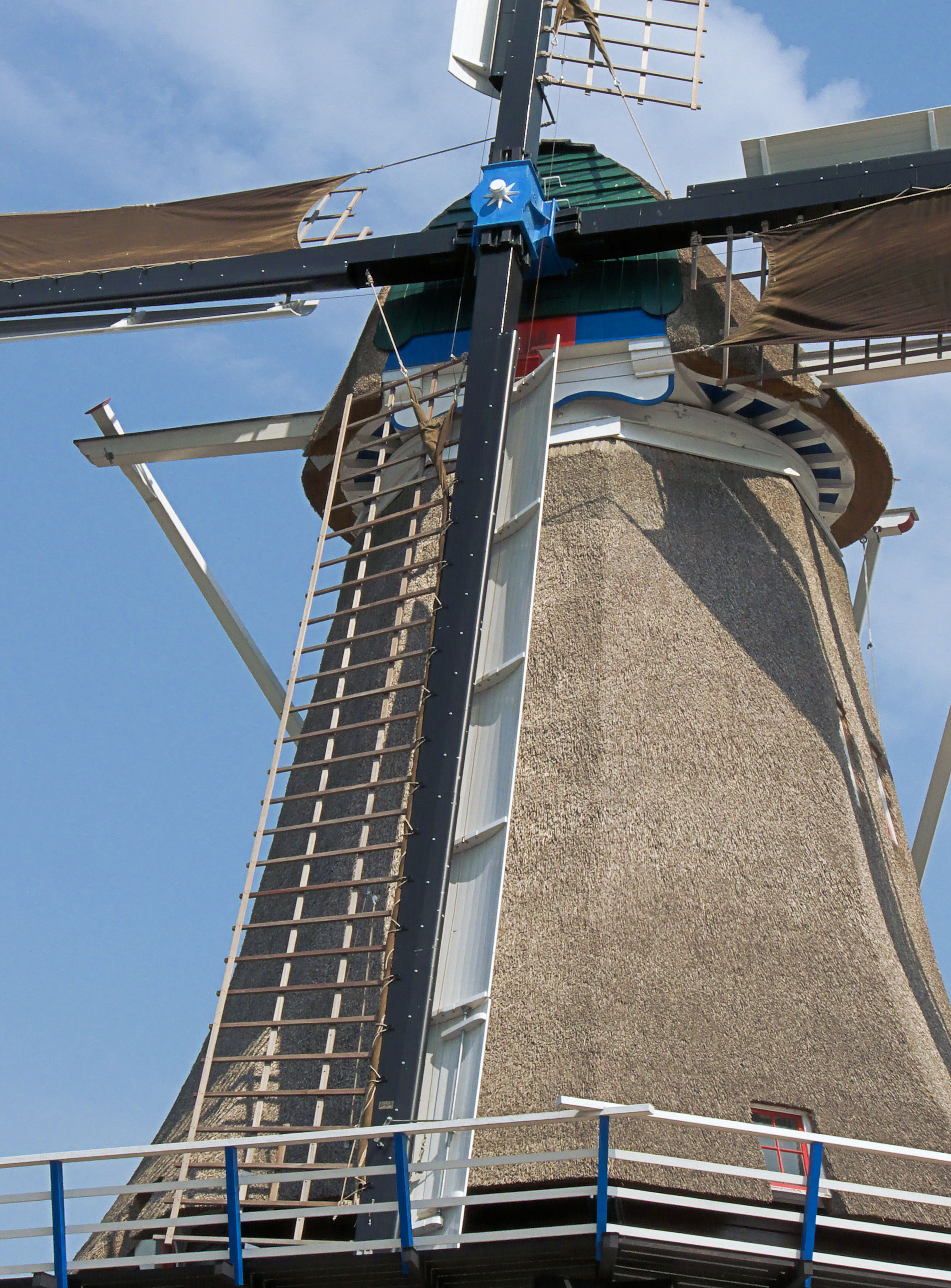 Molen De Koe, Ermelo, houten achtkant